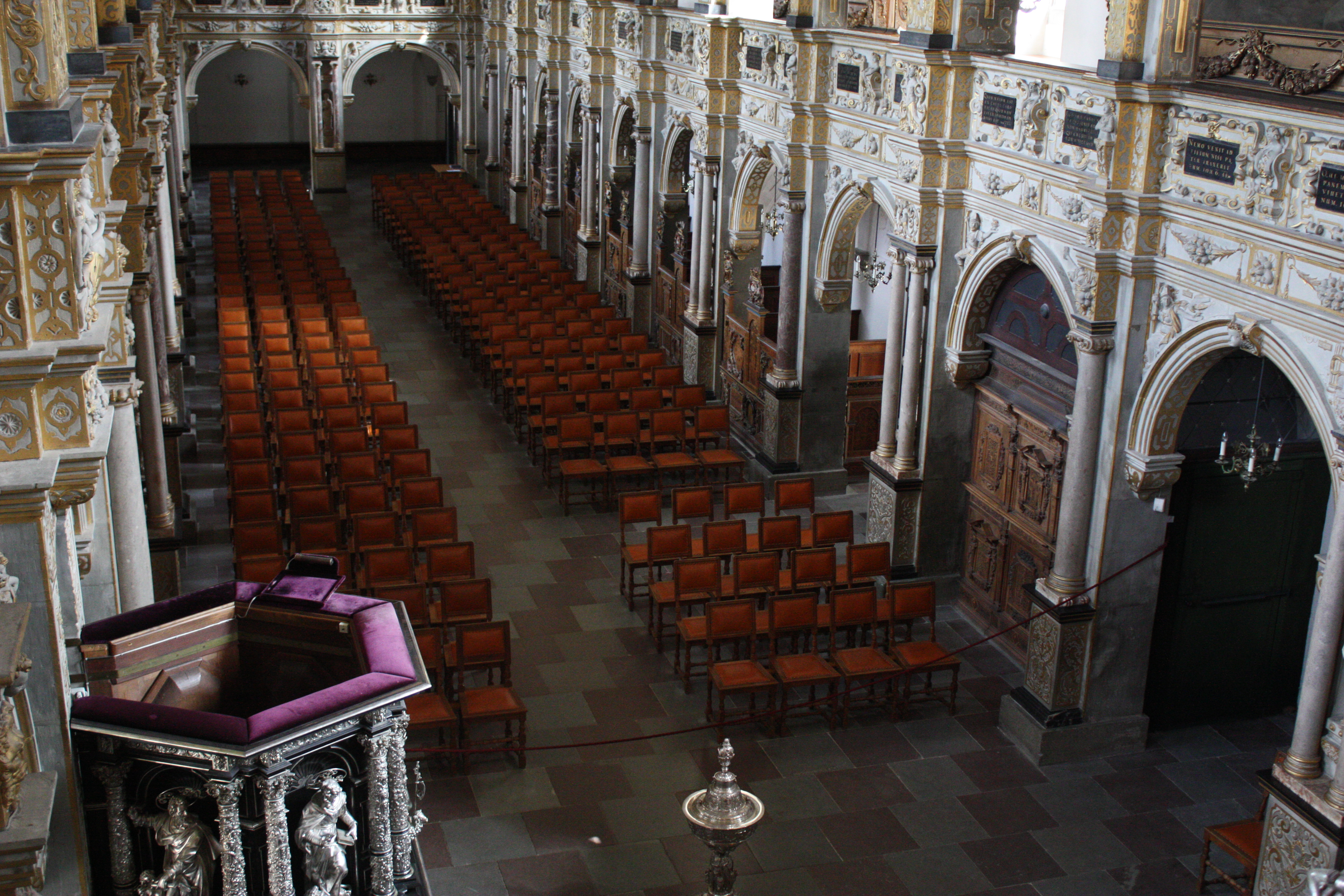 August 2009